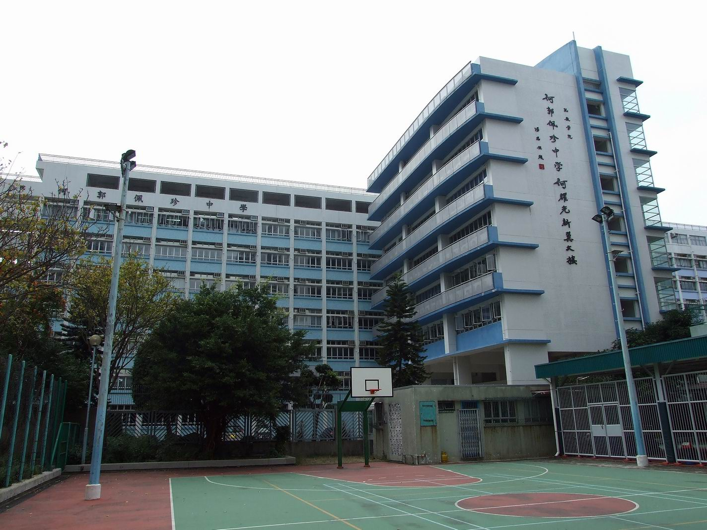 孔教學院何郭佩珍中學